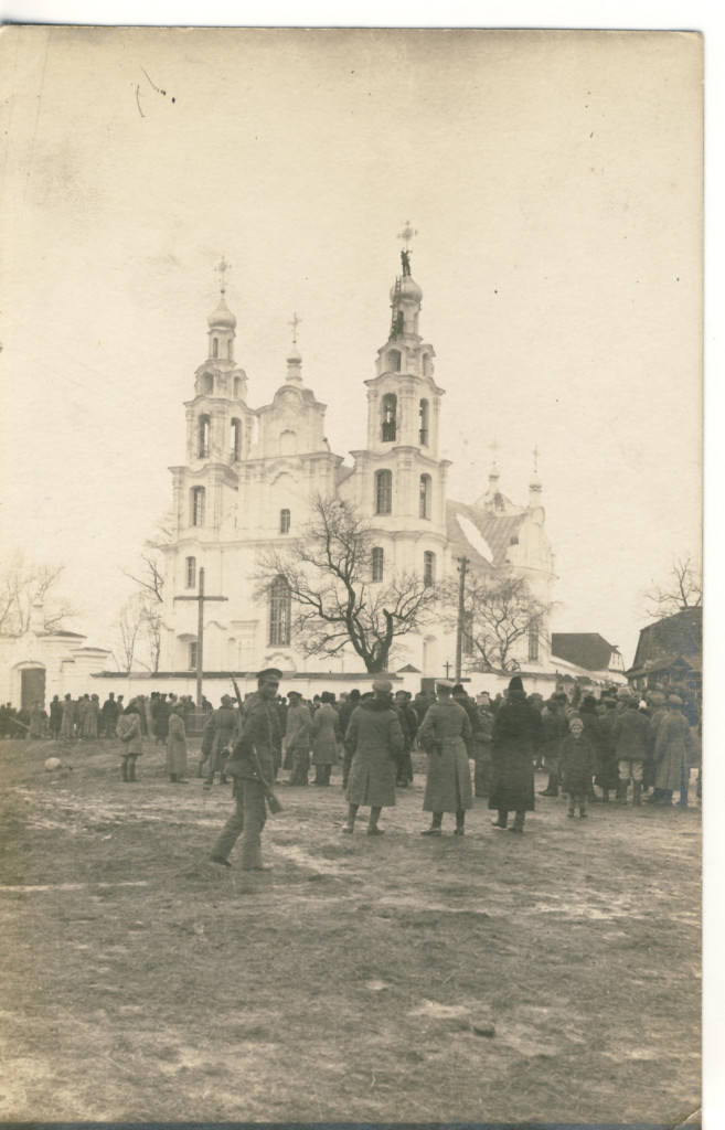 Івянец, Касцёл св.Міхаіла Арханёла (Белы касцёл)Беларуская (тарашкевіца): Івянец (Ivianiec), рог вуліц Віленскай (vulica Vilenskaja) і Закляштарнай (vulica Zaklaštarnaja). Касьцёл Сьвятога Міхала Арханёла і кляштар францішканаў